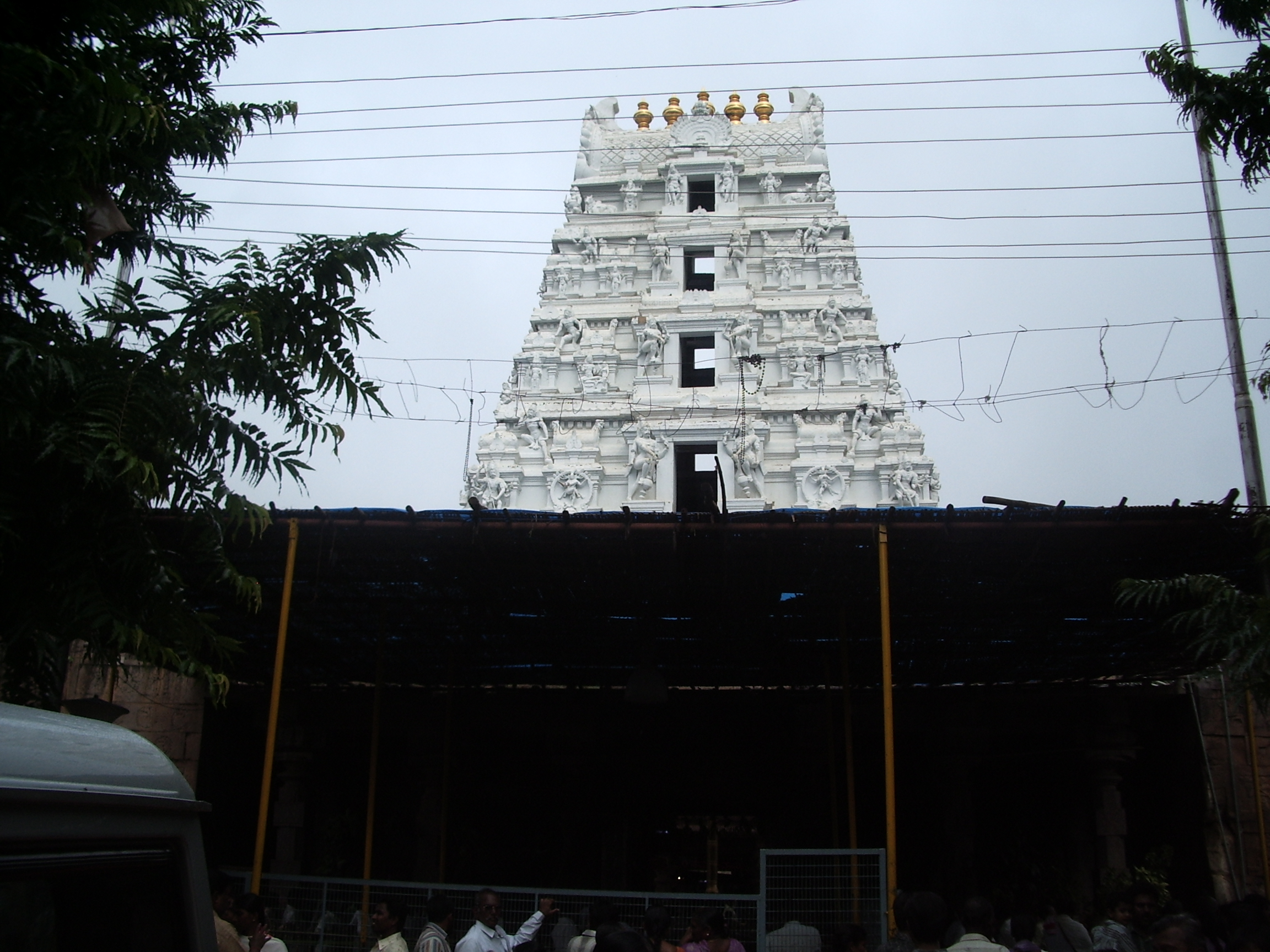 Srisailam devastanam temple entrance